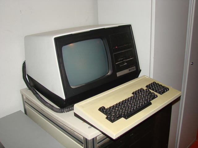 Iskra Delta Partner.